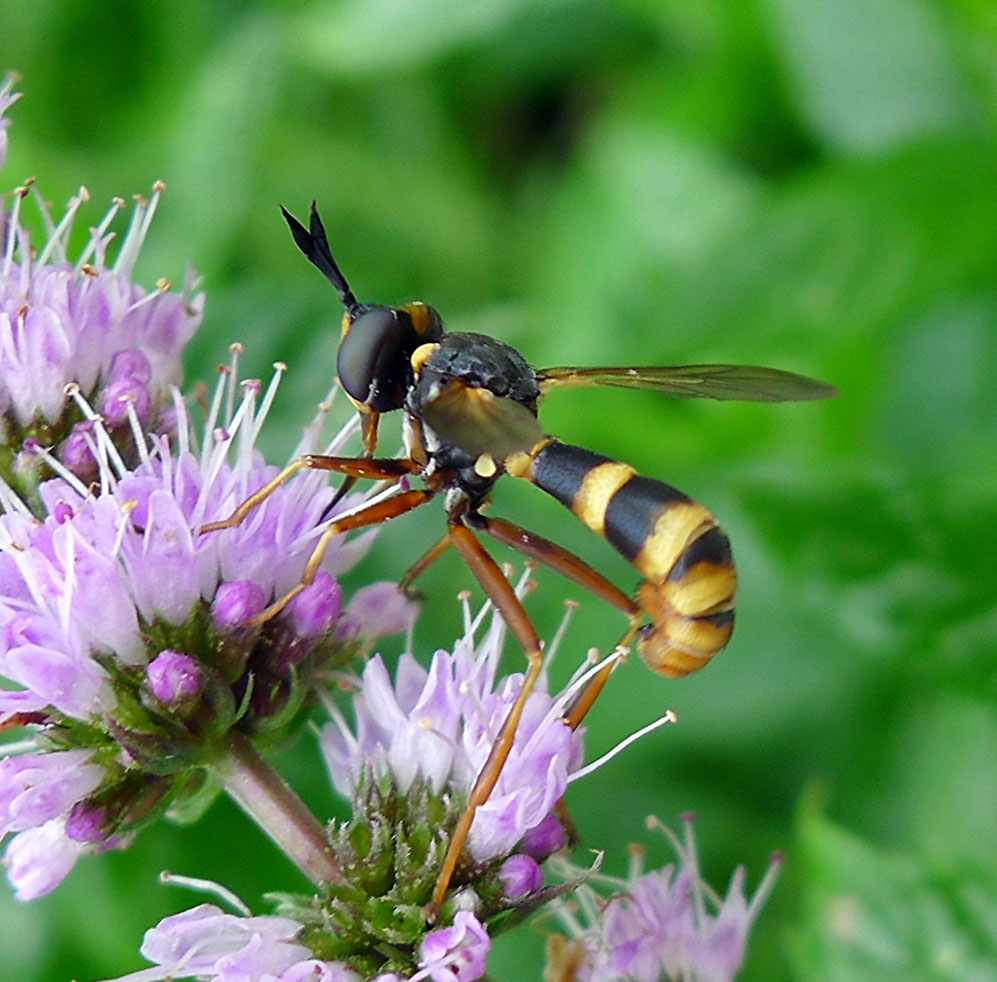 Conops quadrifasciatus. Conopidae. Female